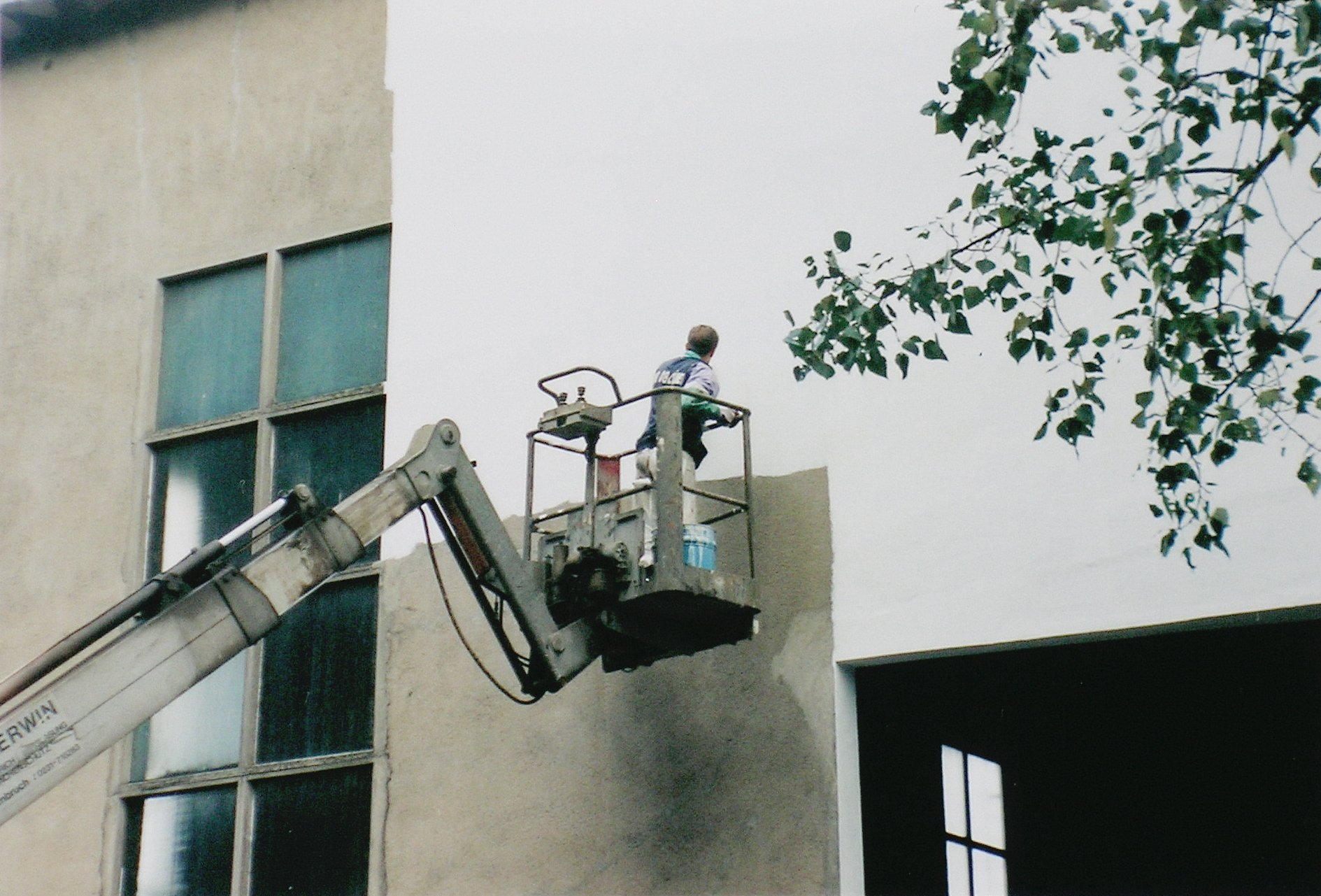 Streichen einer Gebäude-Fassade